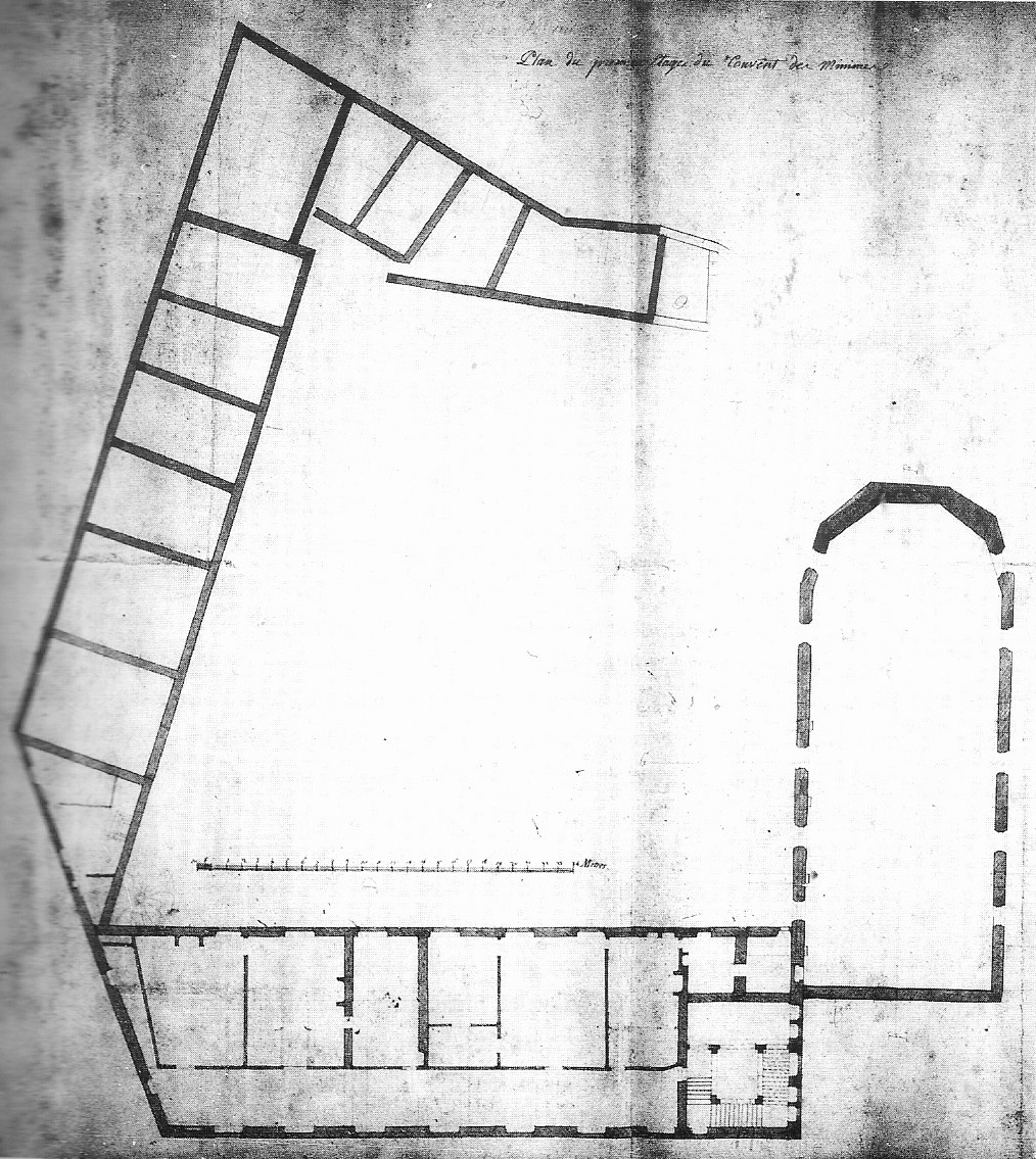 Plan du 1er étage du couvent des Minimes (1646) de Grenoble. Archives départementales de l'Isère.